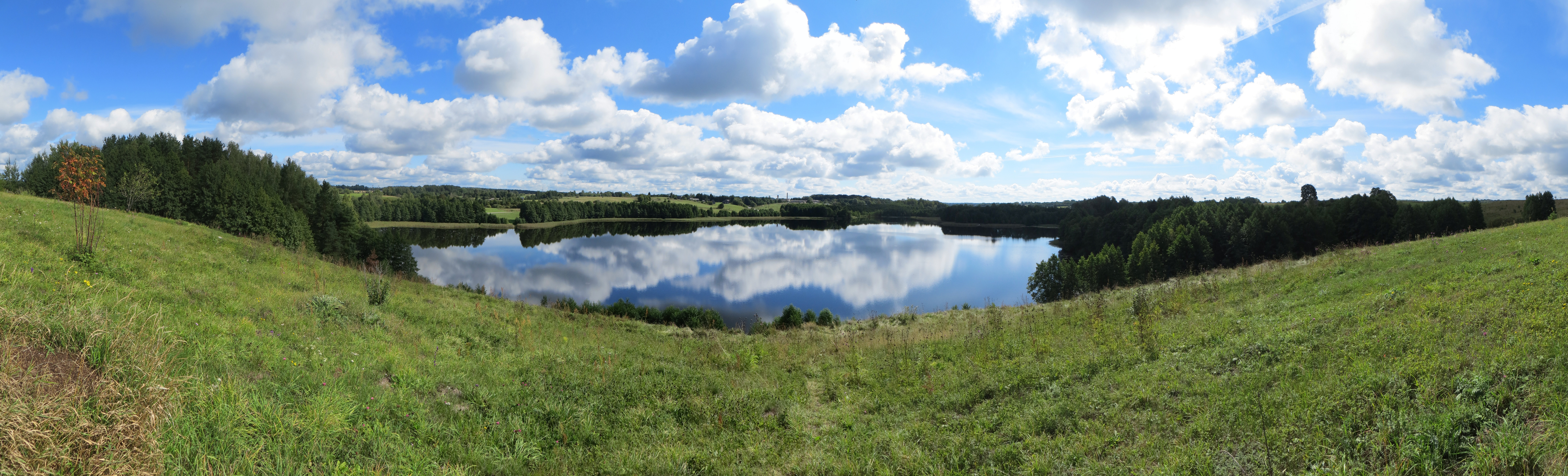 Panorama nuo Sokiškių piliakalnio